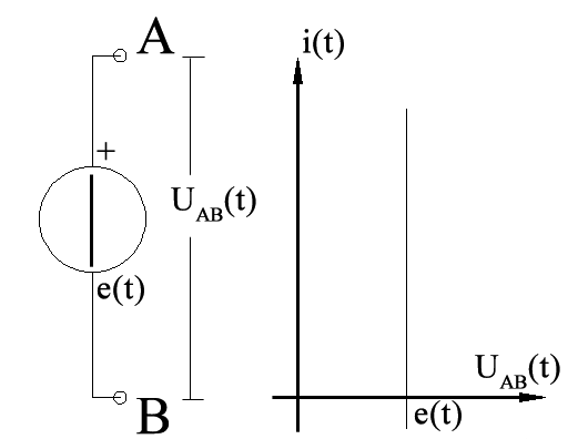 autore: Len zuò descrizione: schema generatore ideale di tensione